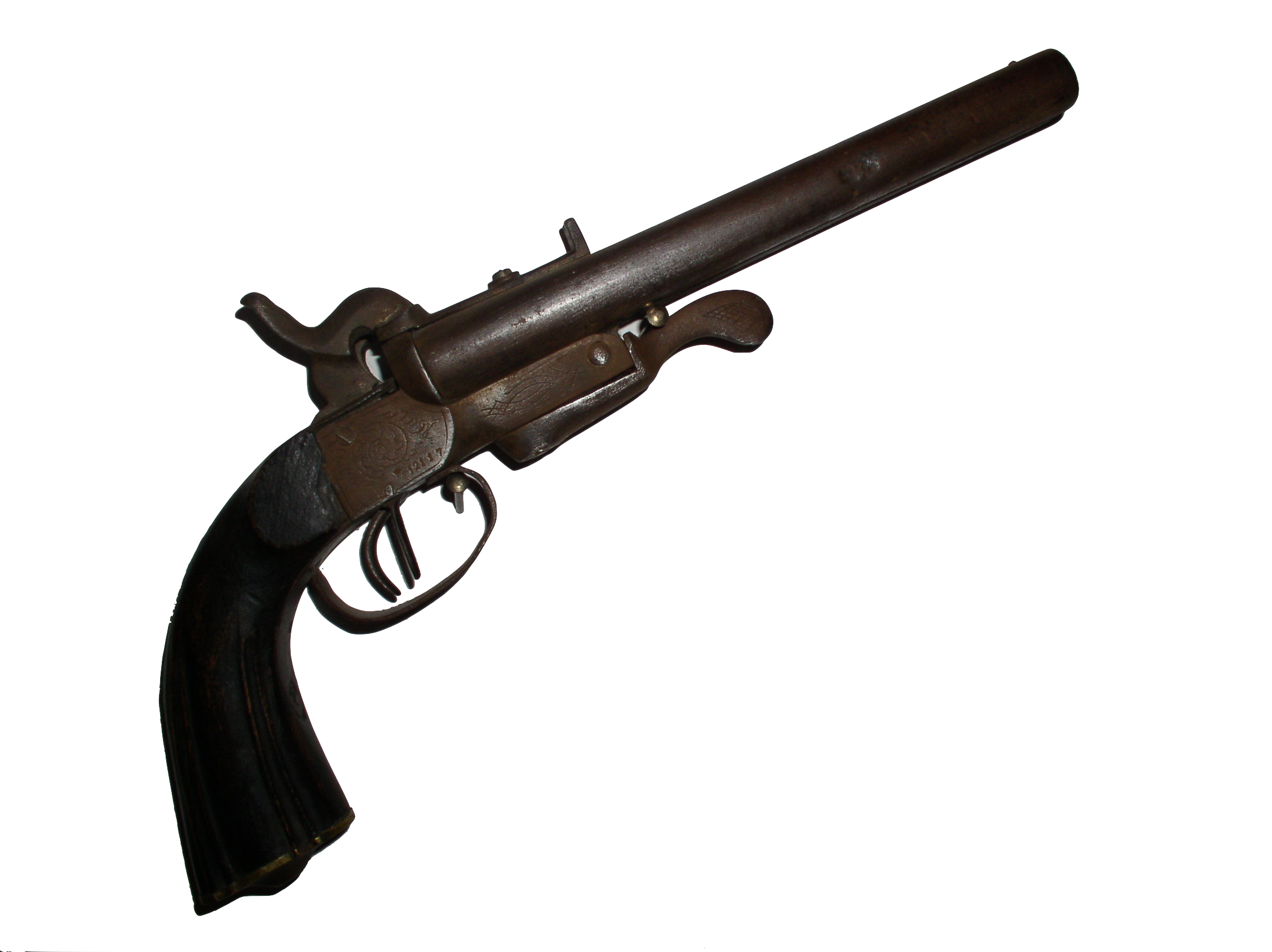 Eine alte Reiterpistole, Doppellauf, 13mm, Stiftpatronen, für Linkshänder. Vor 1900. Hängt bei mir Zuhause an der Wand.